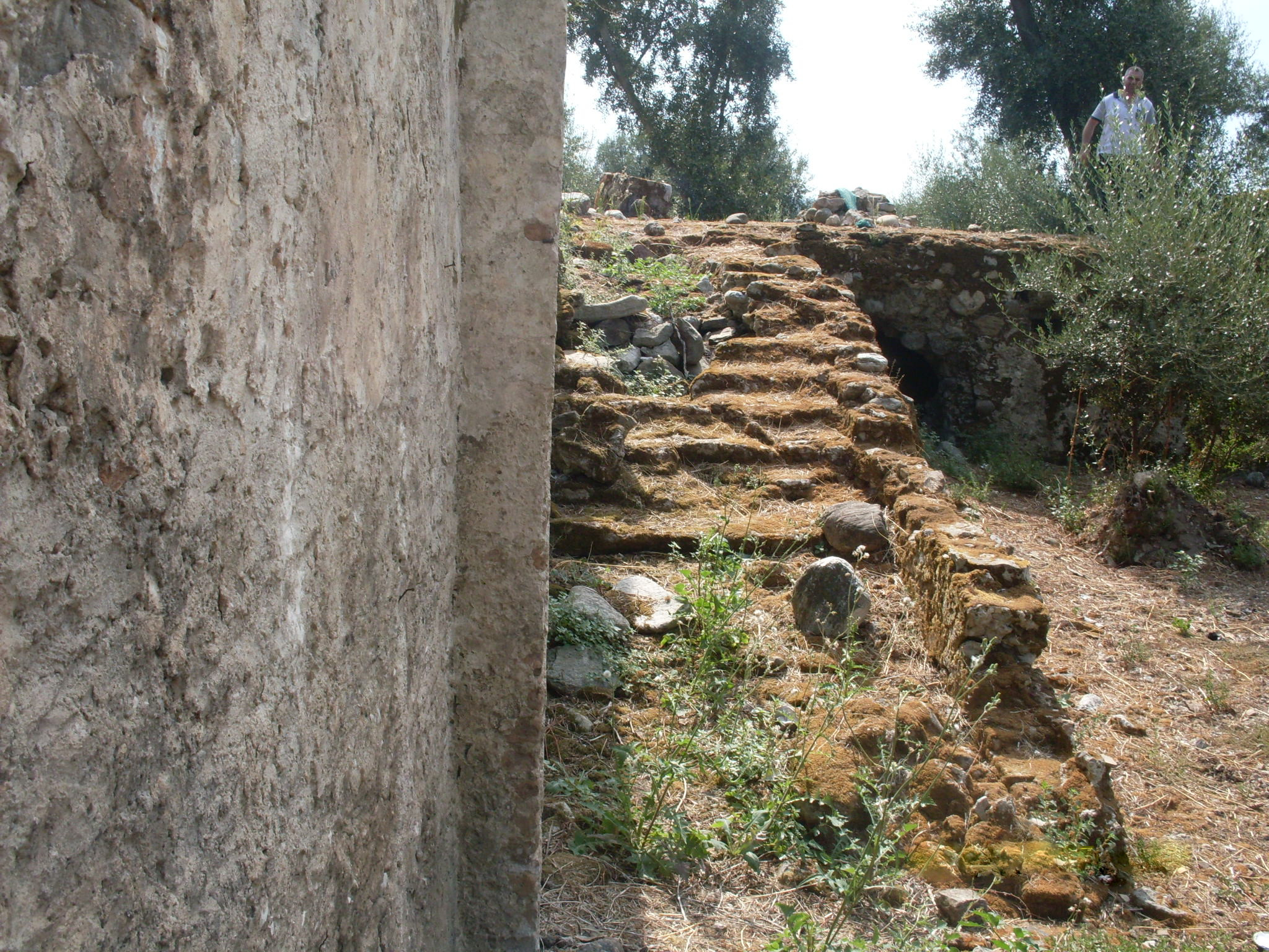 Resti della scala interna della Cattedrale di Oppido Antica a fianco si nota il muro perimetrale della chiesa.